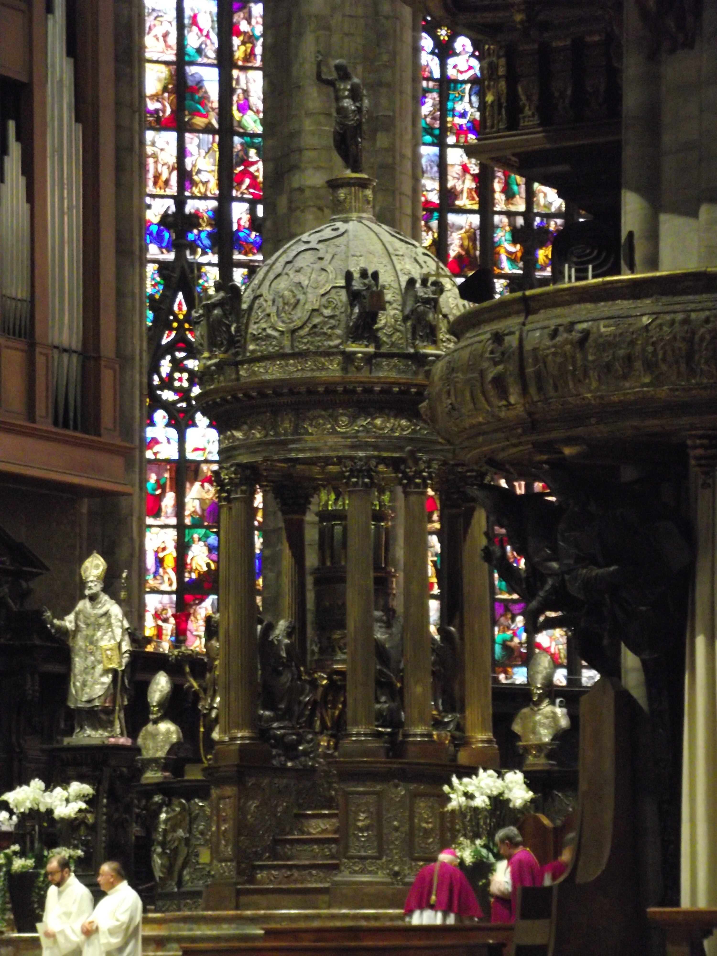 Ciborio